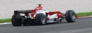 Takuma Sato driving for Super Aguri at the 2008 Malaysian Grand Prix.